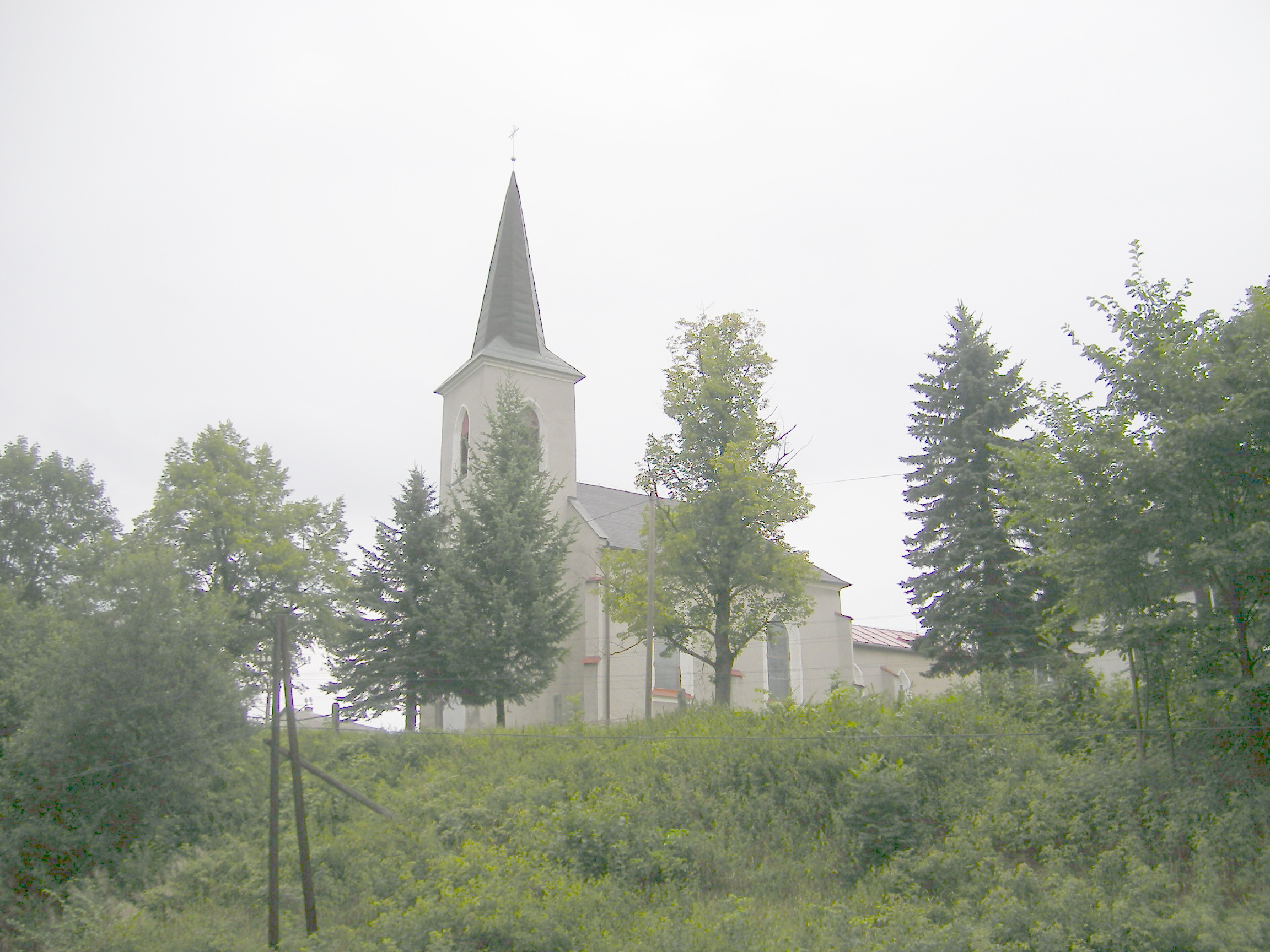 Kremnické Bane (okres Žiar nad Hronom)